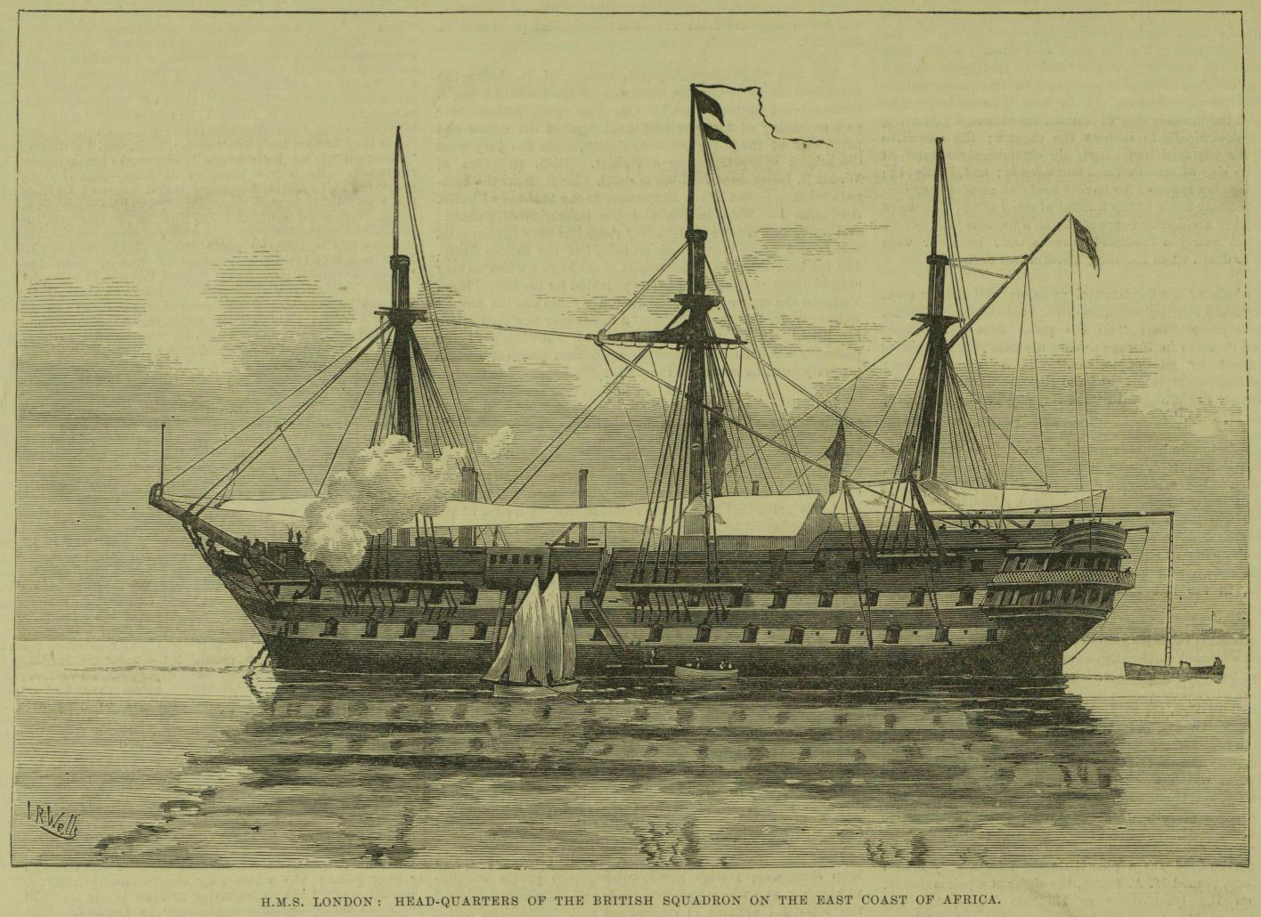 HMS London depicted in Zanzibar, 1881.